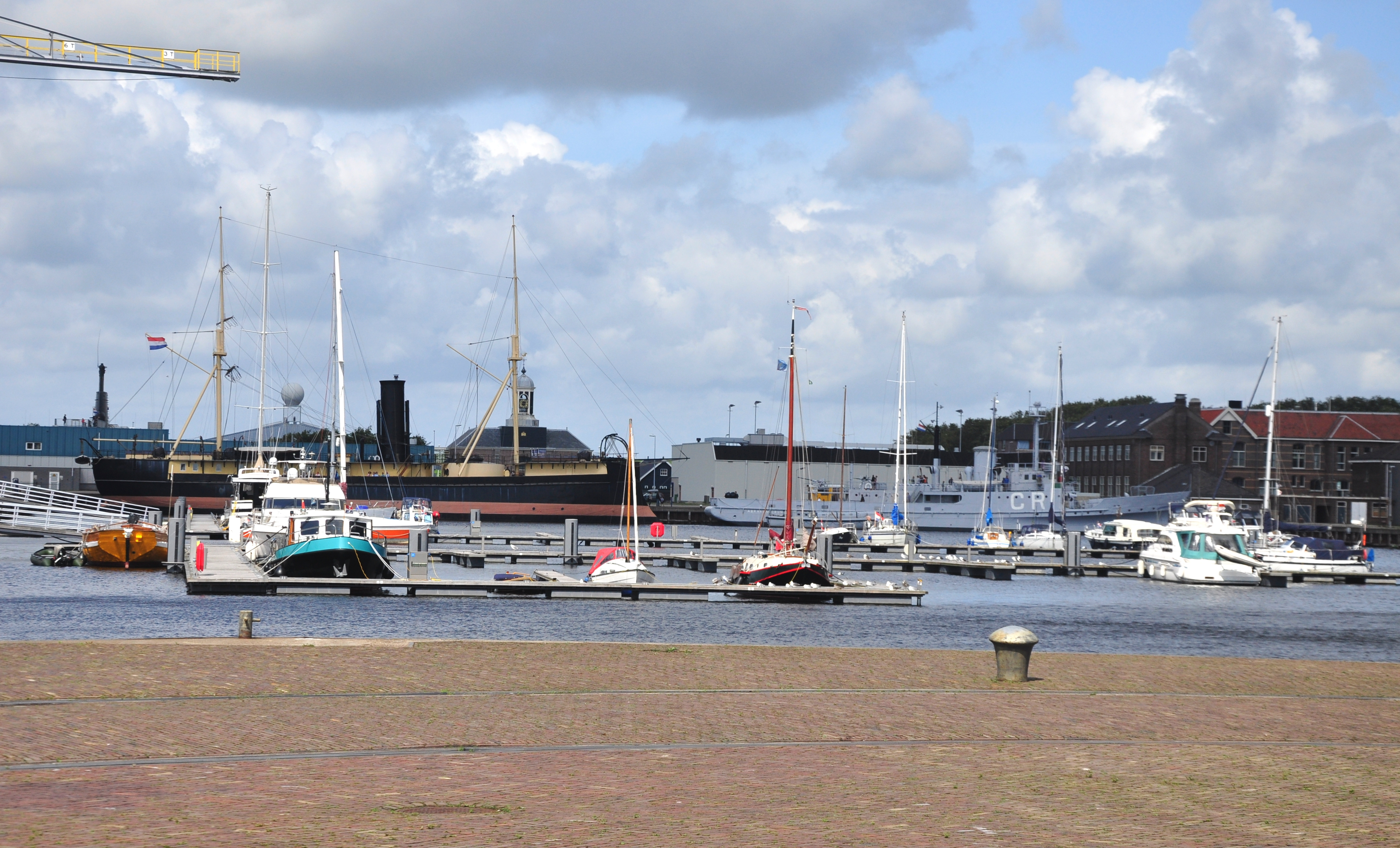 Holland, Den helder, Hafenmuseum